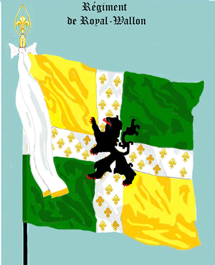 Ordonnanzfahne eines königlich französischen Infanterie-Regiments. (Fremdenregiment aus Wallonien)- Entnommen und überarbeitet aus: „LES UNIFORMES ET LES DRAPEAUX DE L'ARMÉE DU ROI“ Marseille 1899. (Drapeau d'Ordonnance d'un régiment française d'infanterie royale. (Régiment etrangéré wallonois.)